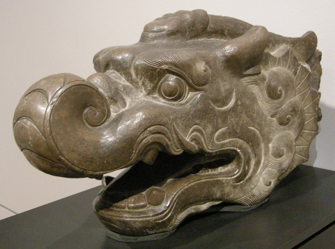 China, testa di makara, norther qi dynasty, 550-577